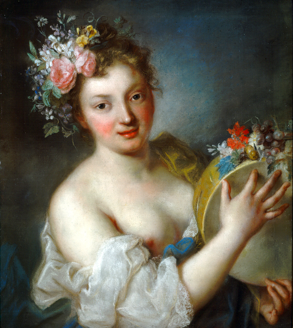 Allegorie der Musik